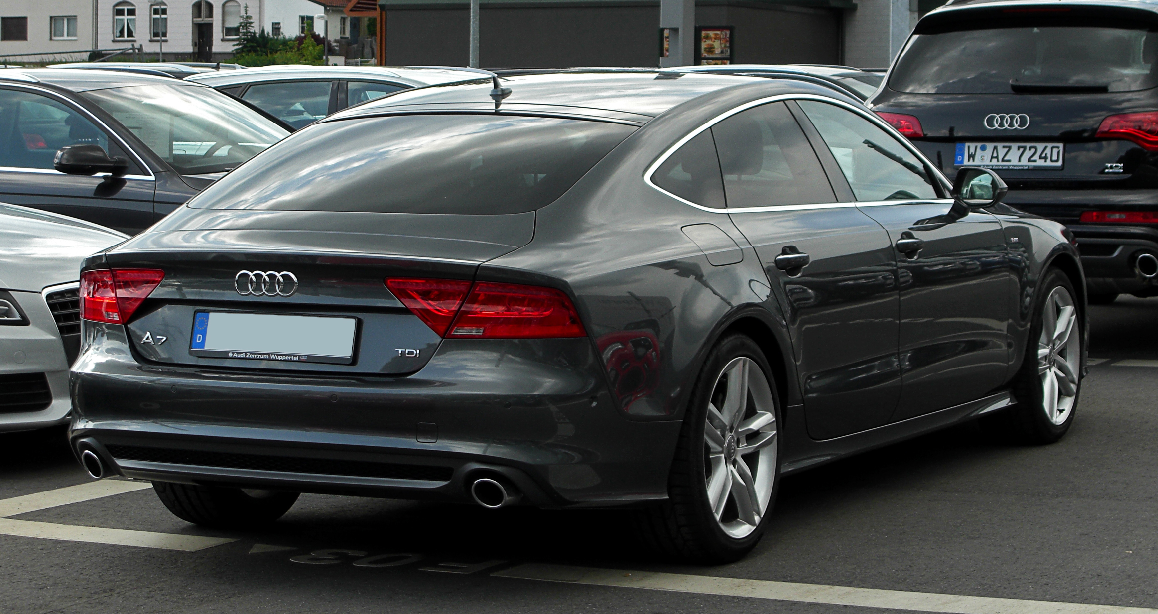 Audi A7 Sportback 3.0 TDI quattro S-line